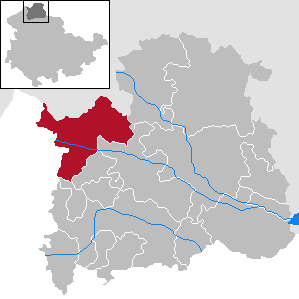 Gemeinde Hohenstein in Thüringen, Landkreis Nordhausen